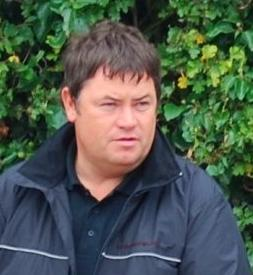 Mike Brewer, motoring journalist and tv presenter.